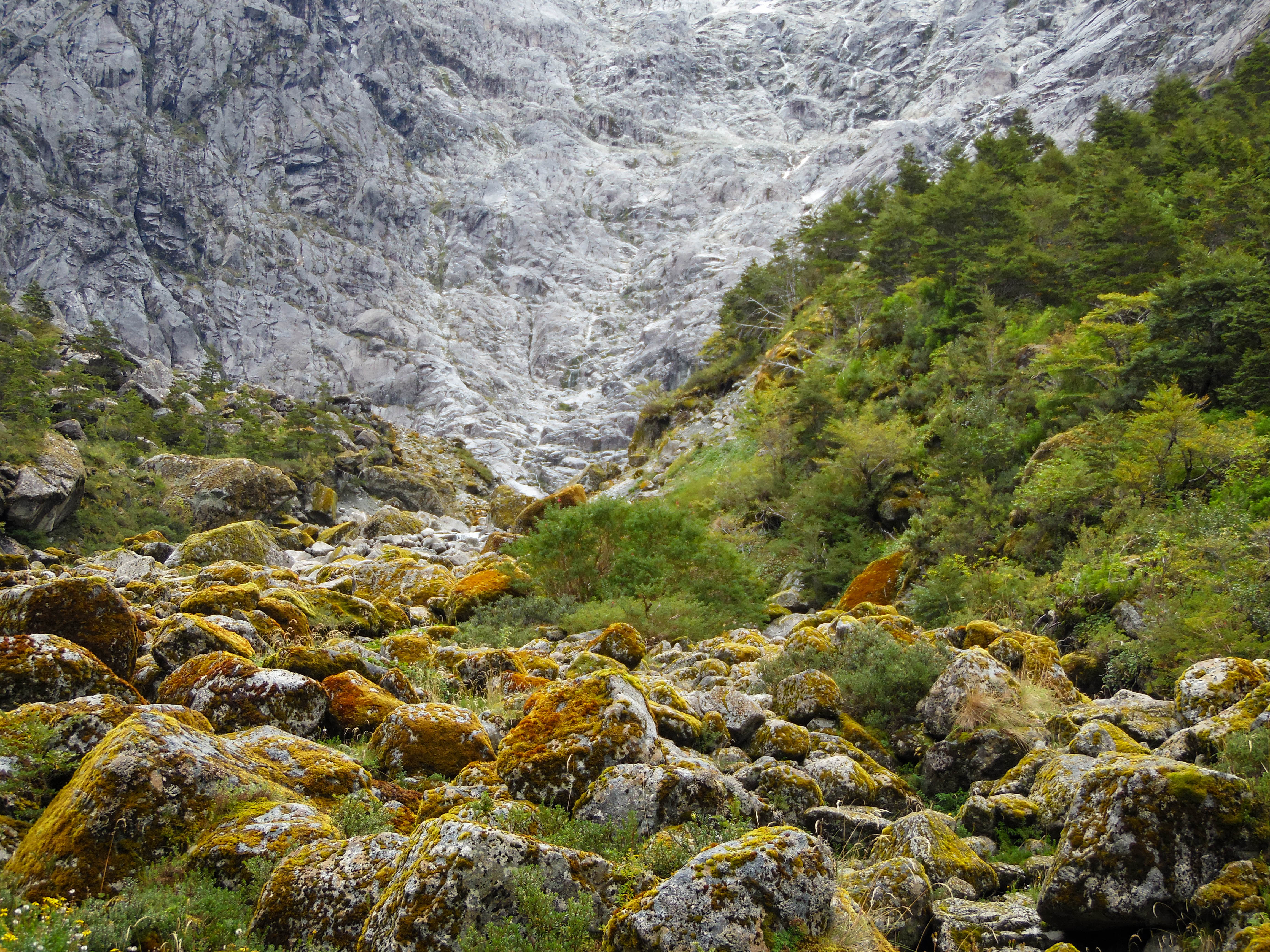 Bosque Encantado, Parque Nacional Queulat. Región de Aysén, Chile.